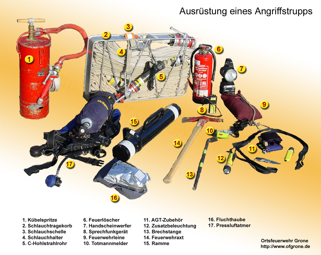 Das Bild zeigt eine Variation der Ausrüstung von Feuerwehren bei einem Innenangriff. (Bild unter der GFDL, erstellt von Magnus Mertens)